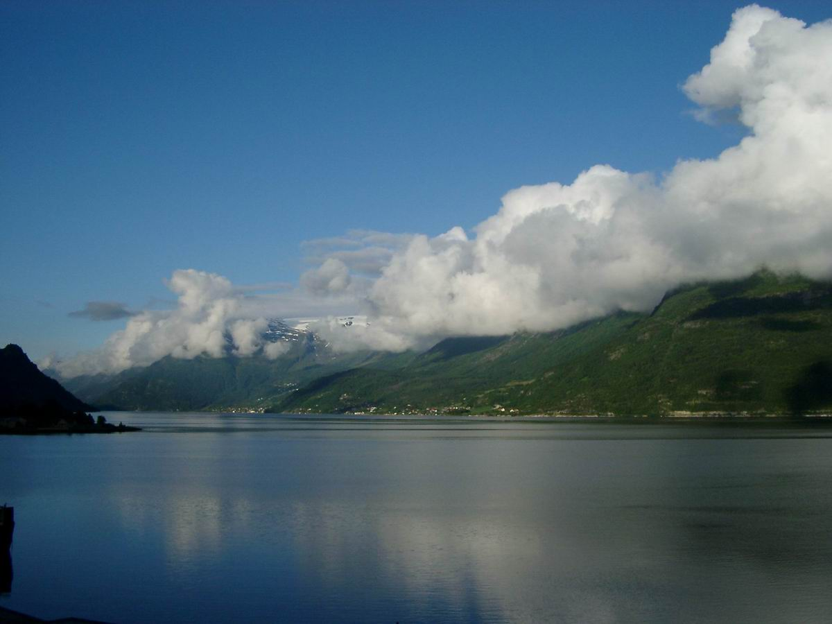 Lofthus Norwegen